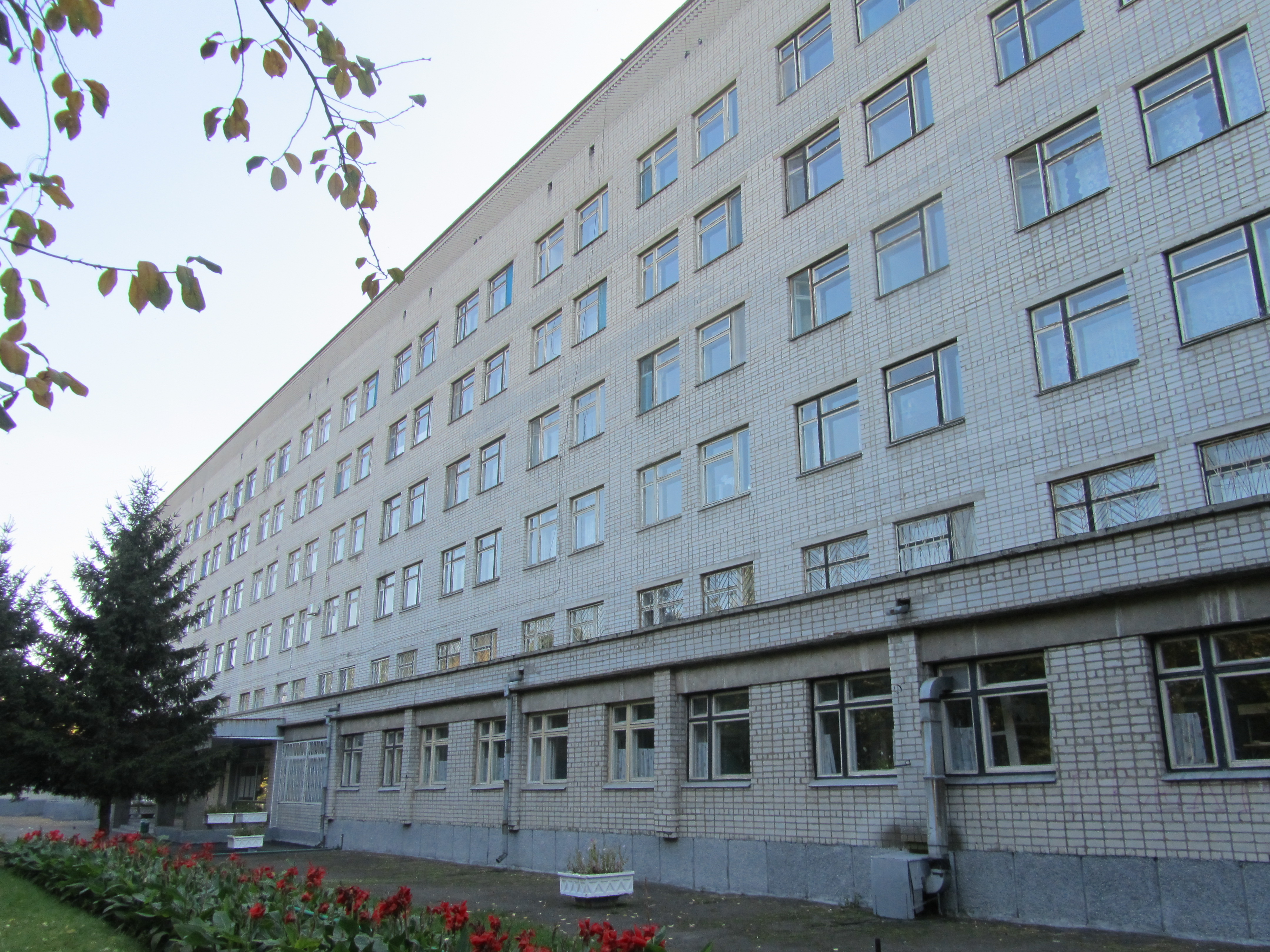 Міська дитяча лікарня у місті Кременчуці. Головний корпус.